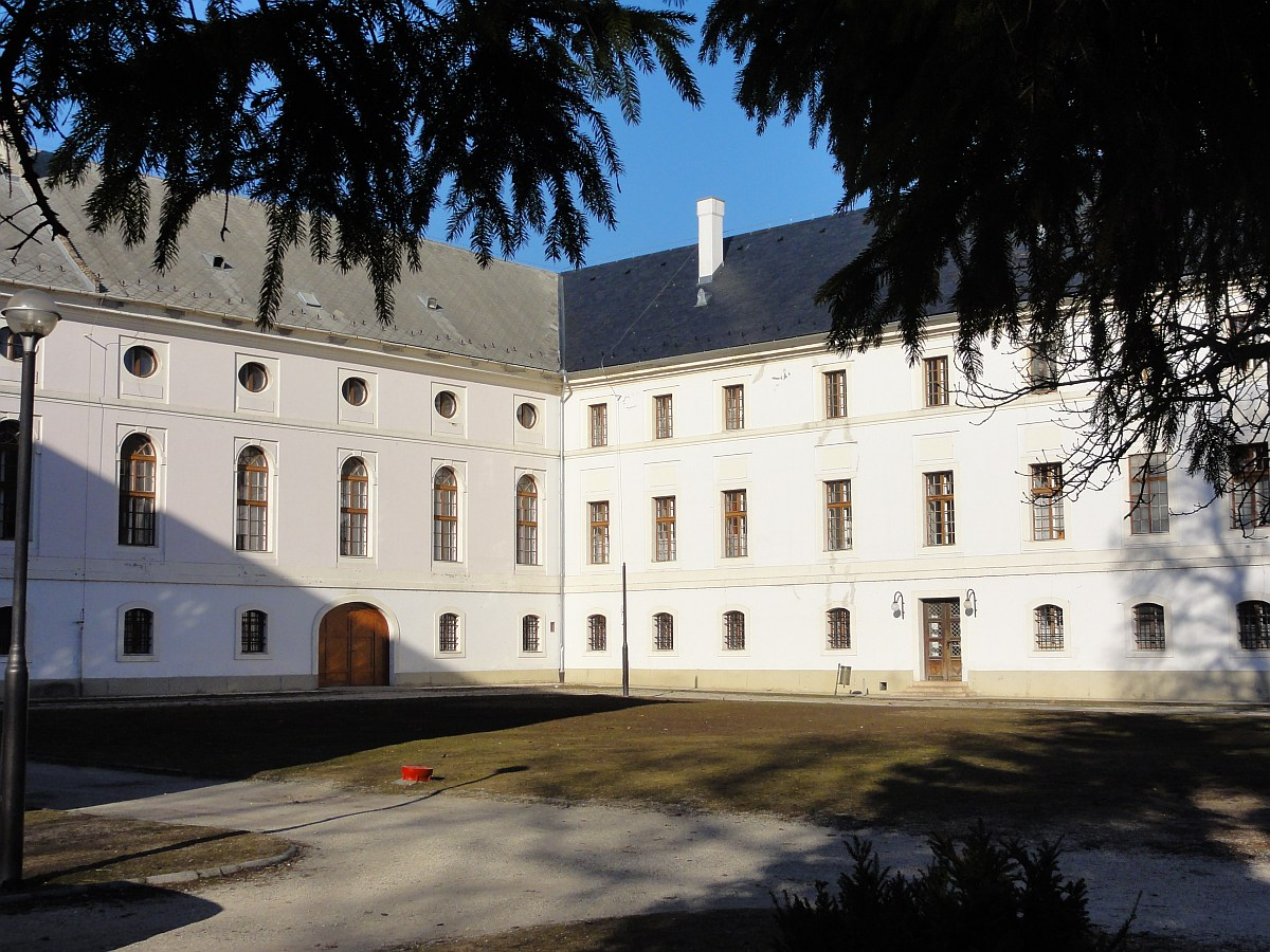 Batthyány-kastély és parkja This is a photo of a monument in Hungary. Identifier: 3570